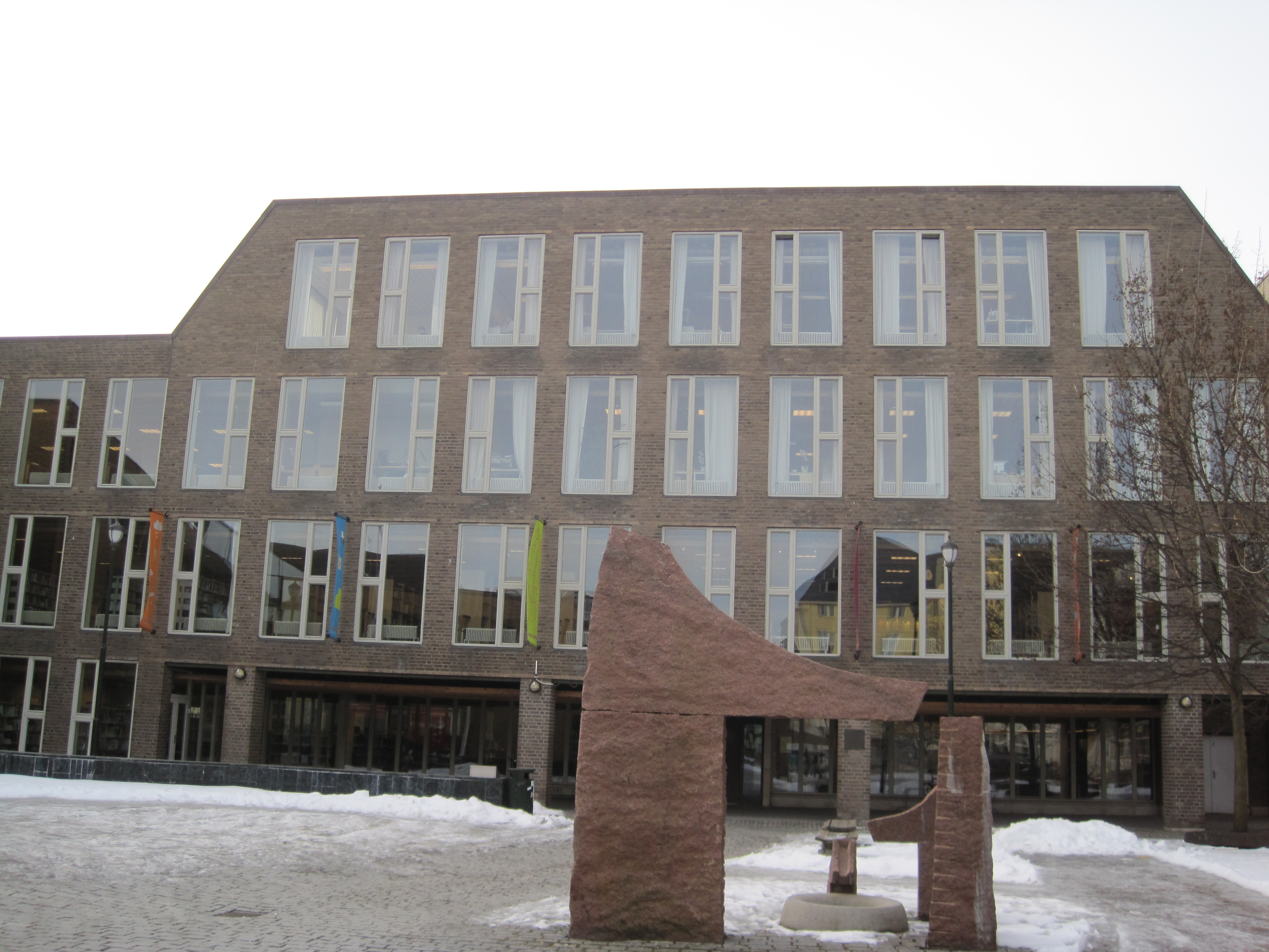 Fylkesbiblioteket i Sør-Trøndelag ligger i 4. etasje i dette bygget på Peter Egges plass i Trondheim. Fylkesbiblioteket er samlokalisert med Trondheim folkebibliotek. Skulpturen i forgrunnen er laget av billedhugger Bård Breivik.